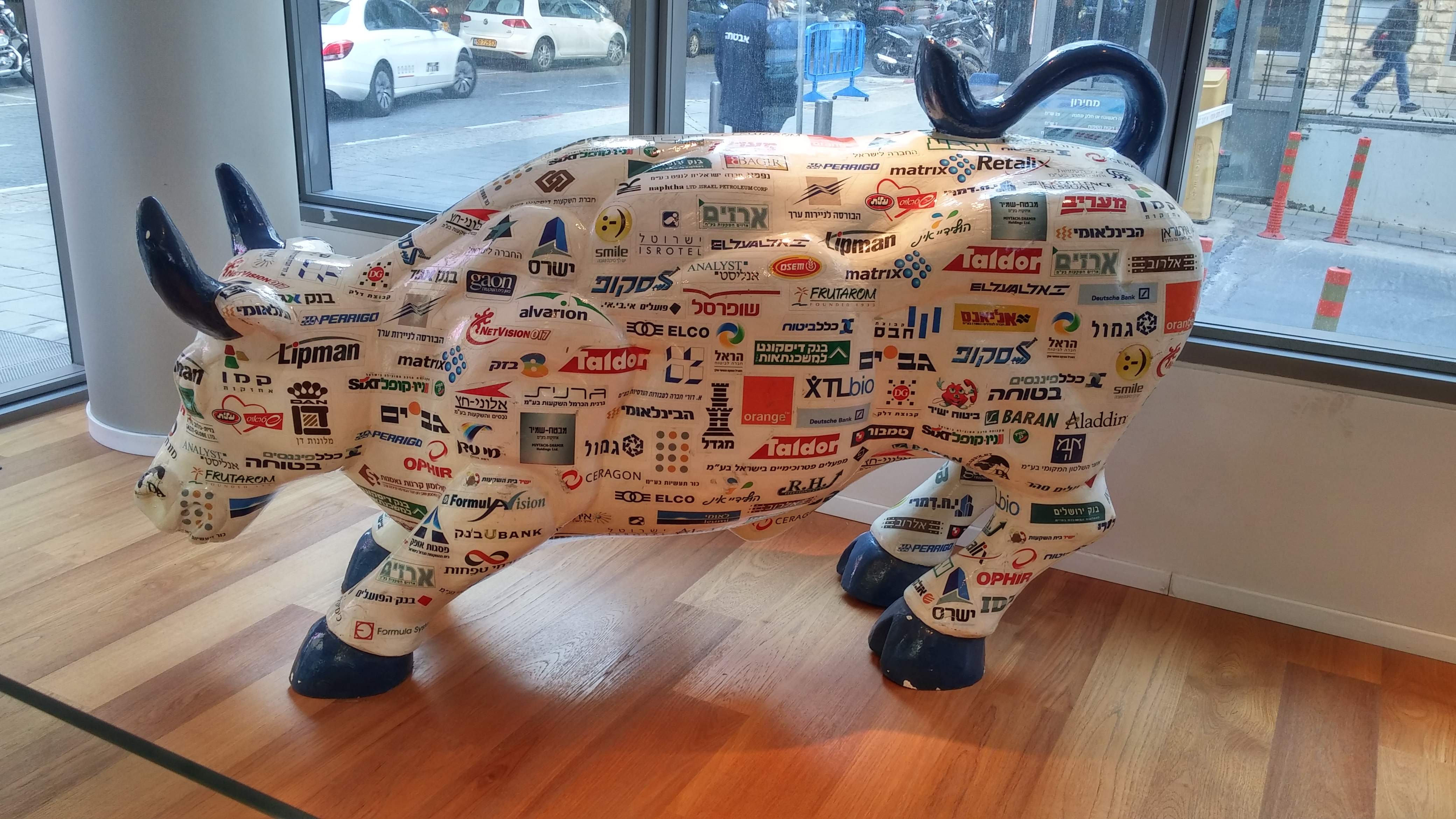 שור ועליו סמלי החברות הנסחרות בבורסה לניירות ערך בתל אביב, בכניסה לבניין הבורסה